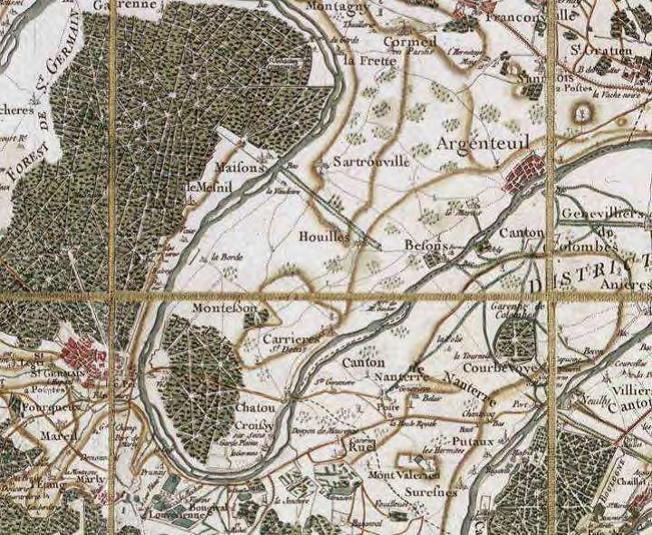 Carte de Cassini (XVIIIe siècle) représentant la boucle de la Seine incluant Chatou et Houilles